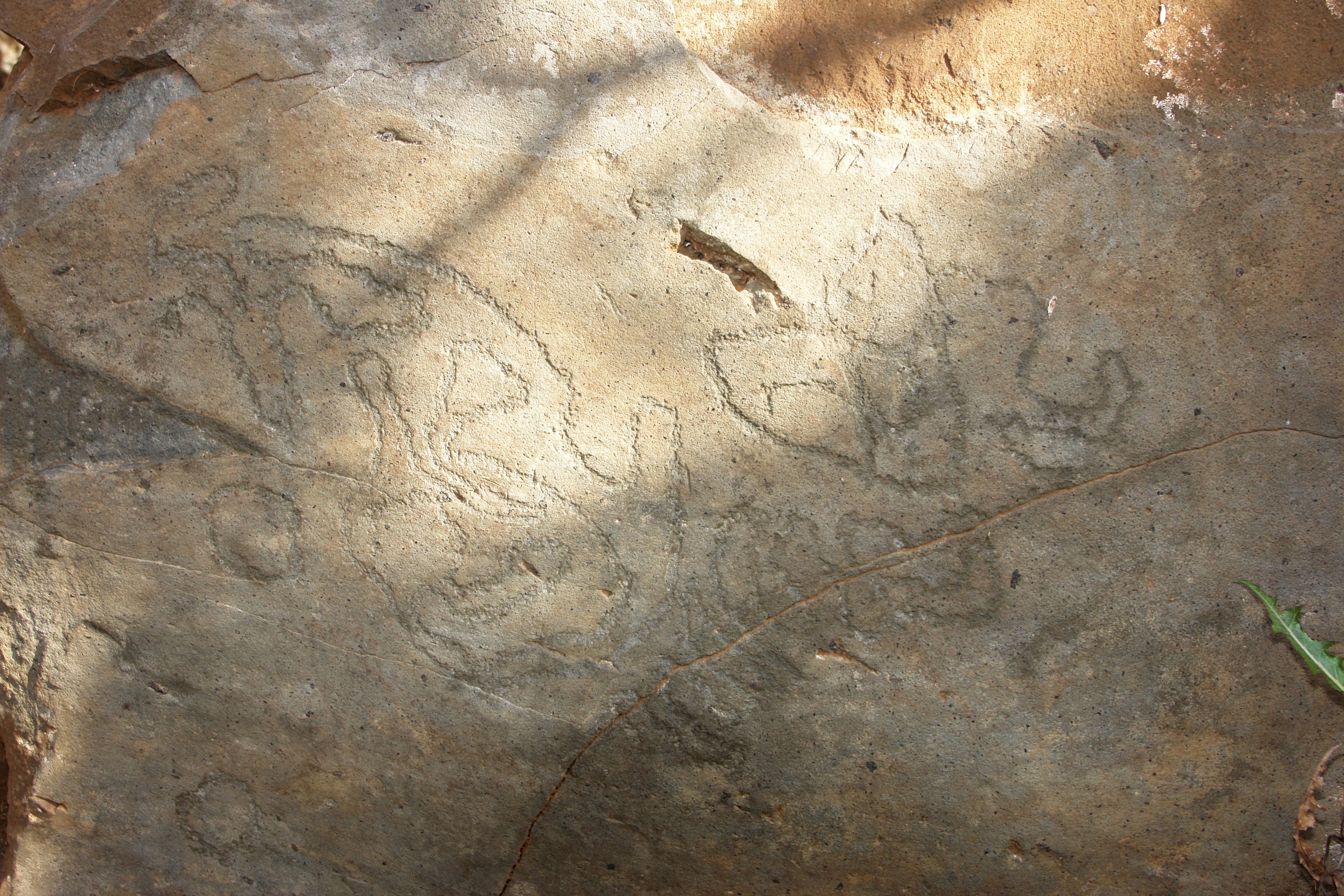 Petroglyphen von La Fajana auf der Spanischen Insel La Palma. Hier einzelne, isoliert von den anderen gelegene Felsgravur.